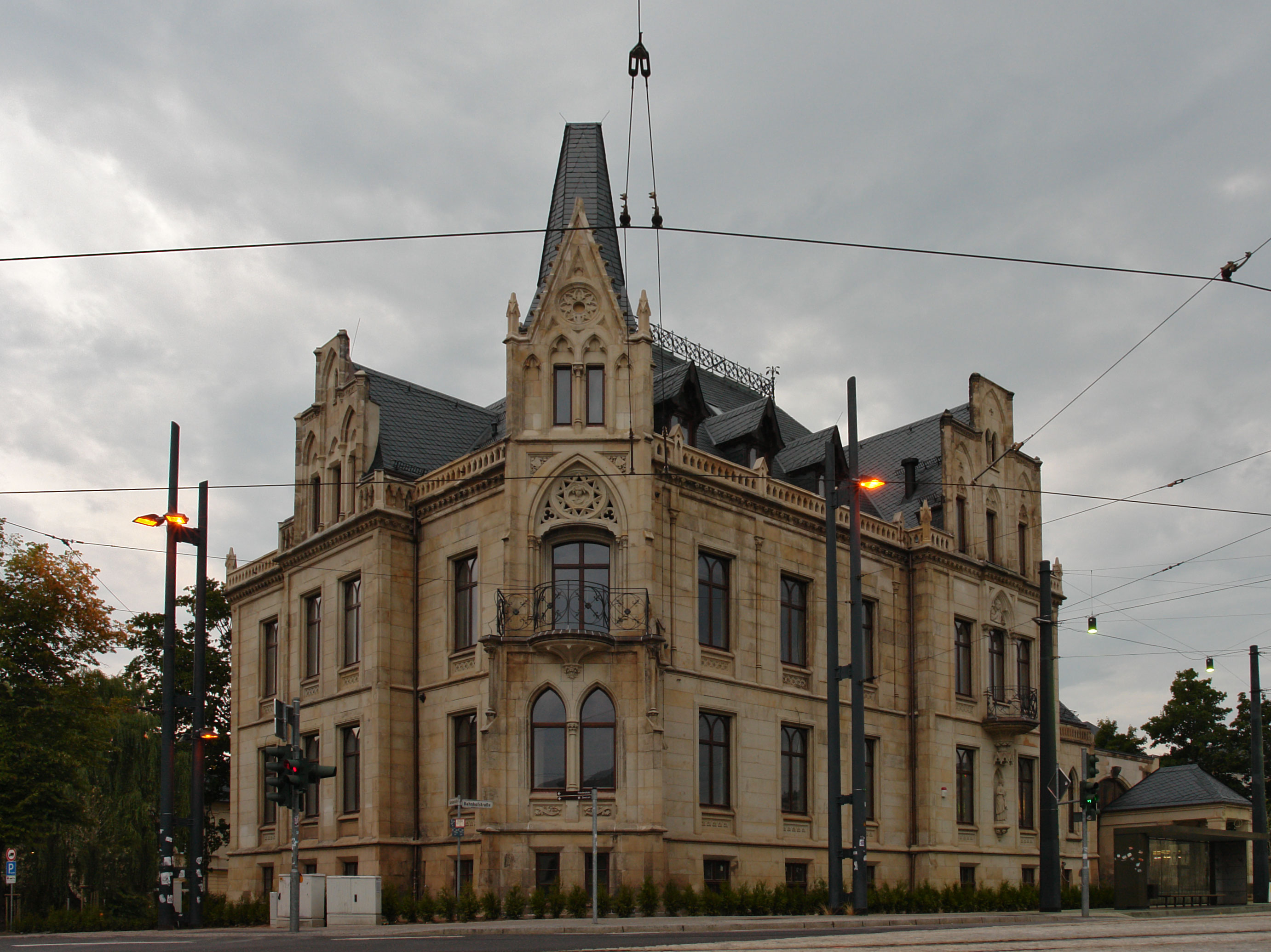 Achtung: das Bild zeigt die Villa Zimmermann und nicht das Carola-Hotel. Das Carola-Hotel stand rechts daneben und wurde abgerissen.